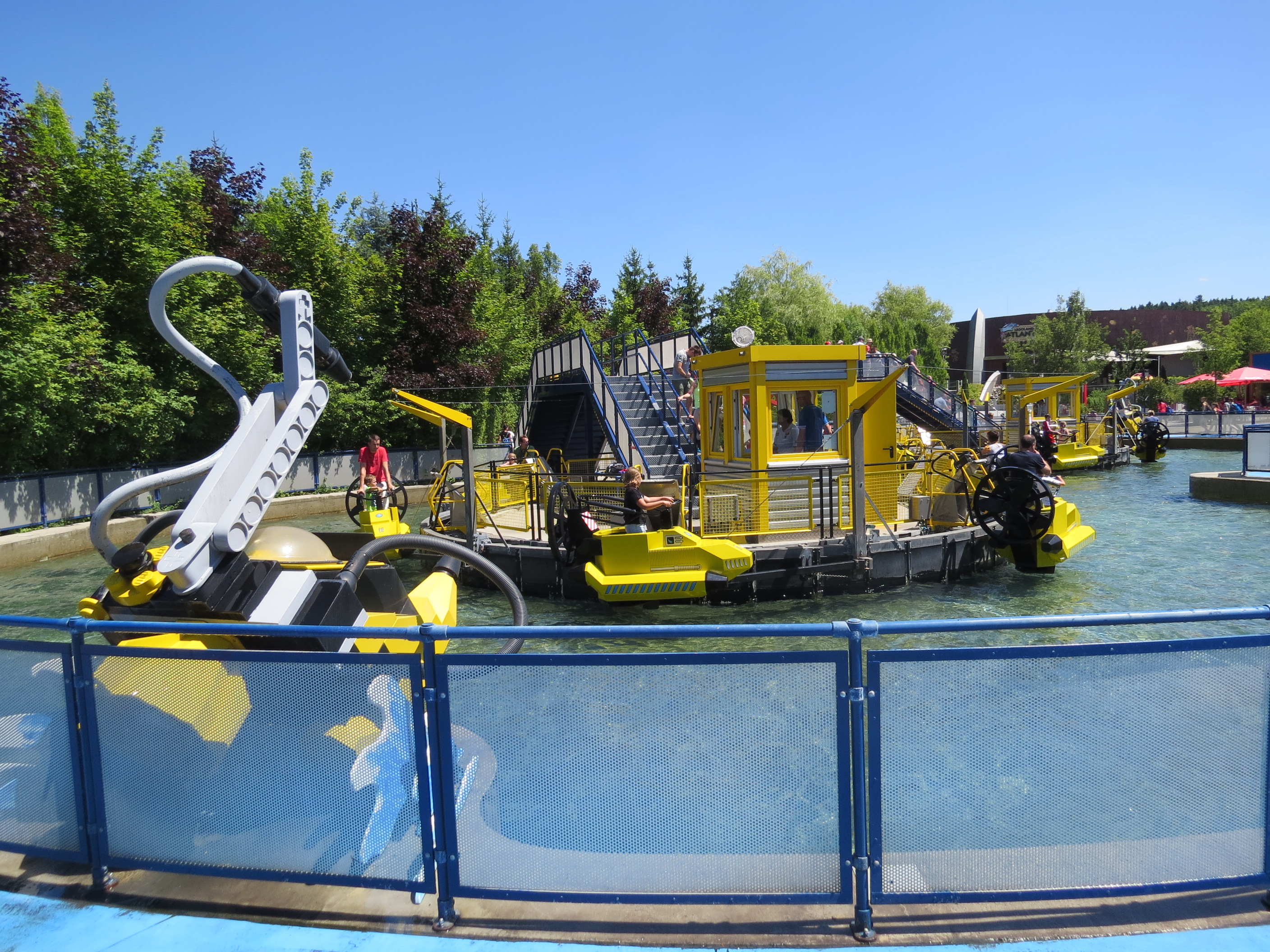 Legoland Deutschland Günzburg